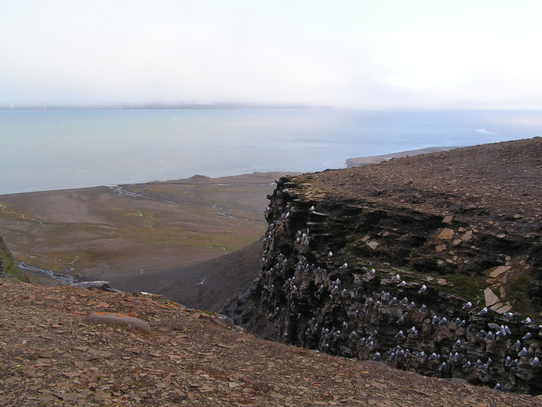 Freeman strait, between Barents island and Edge island